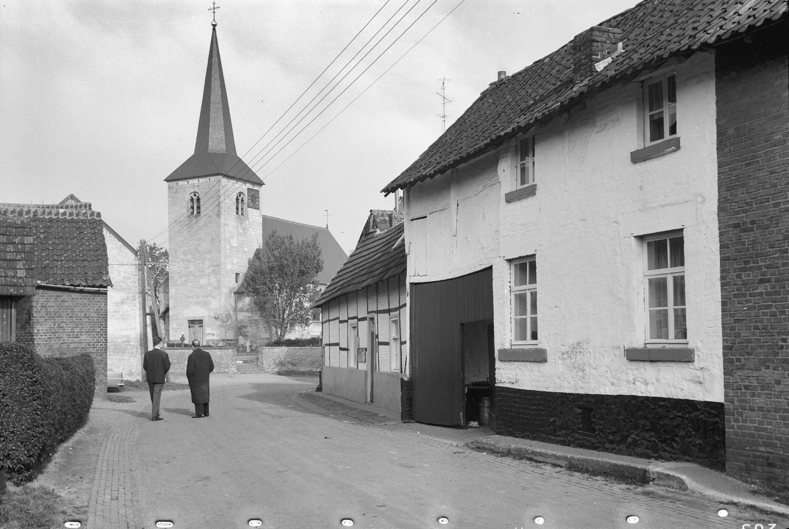 voorzijde